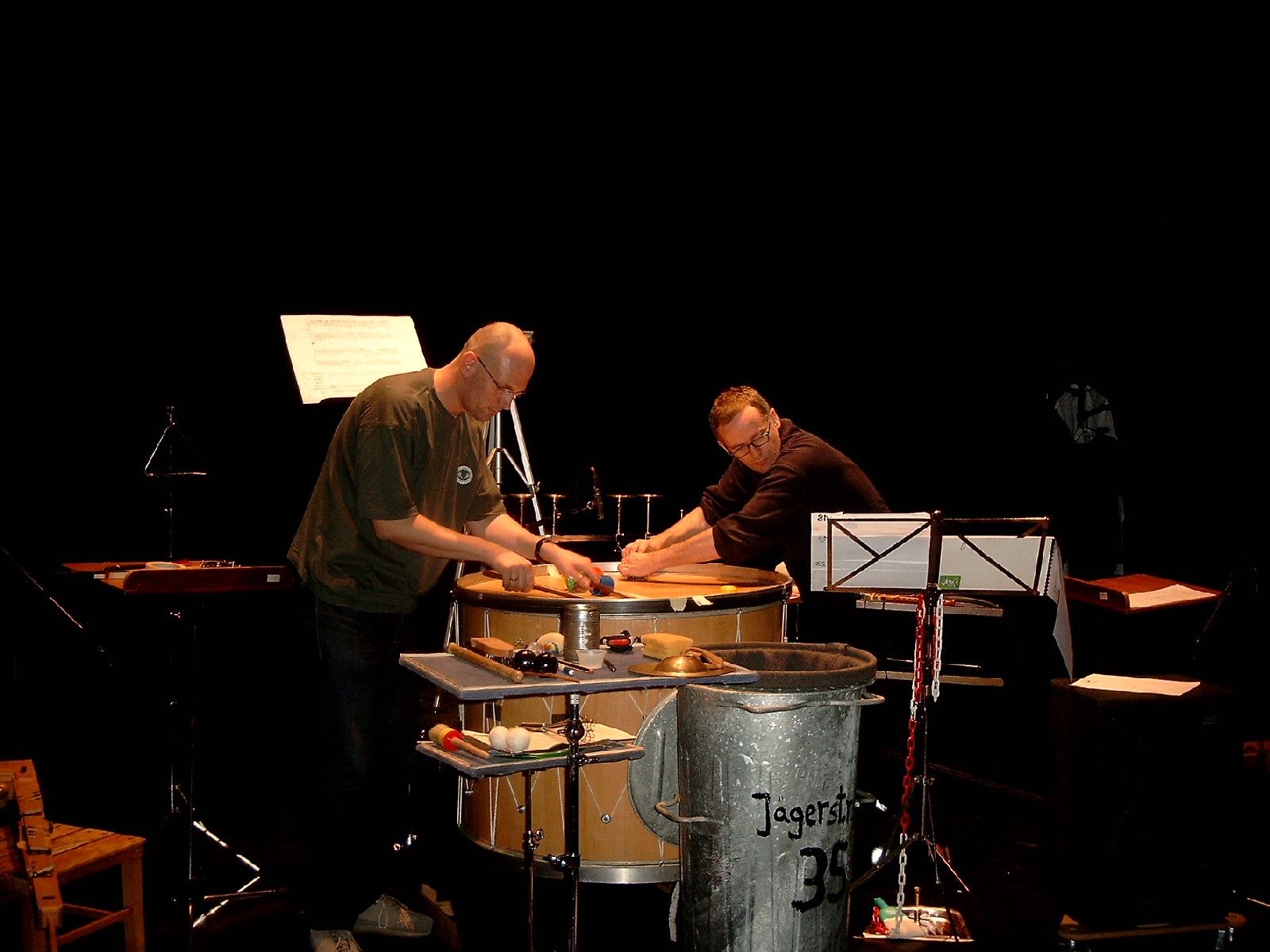 Das 'ensemble für erstaunliche musik [archae.o.pteryx]' bei der Interpretation von 'writing' von Harald Muenz in den Kammerspielen Mainz